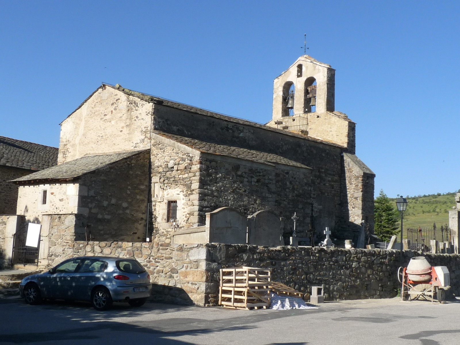 Eglise de Villeneuve, Angoustrine-Villeneuve-des-Escaldes, P.O., France